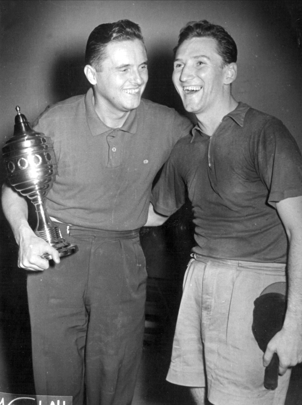 Vilim Harangozo i Žarko Dolinar, jugoslovenski stonoteniseri i reprezentativci.Foto:Stevan Kragujević (po odobrenju kćerke Tanje Kragujević)